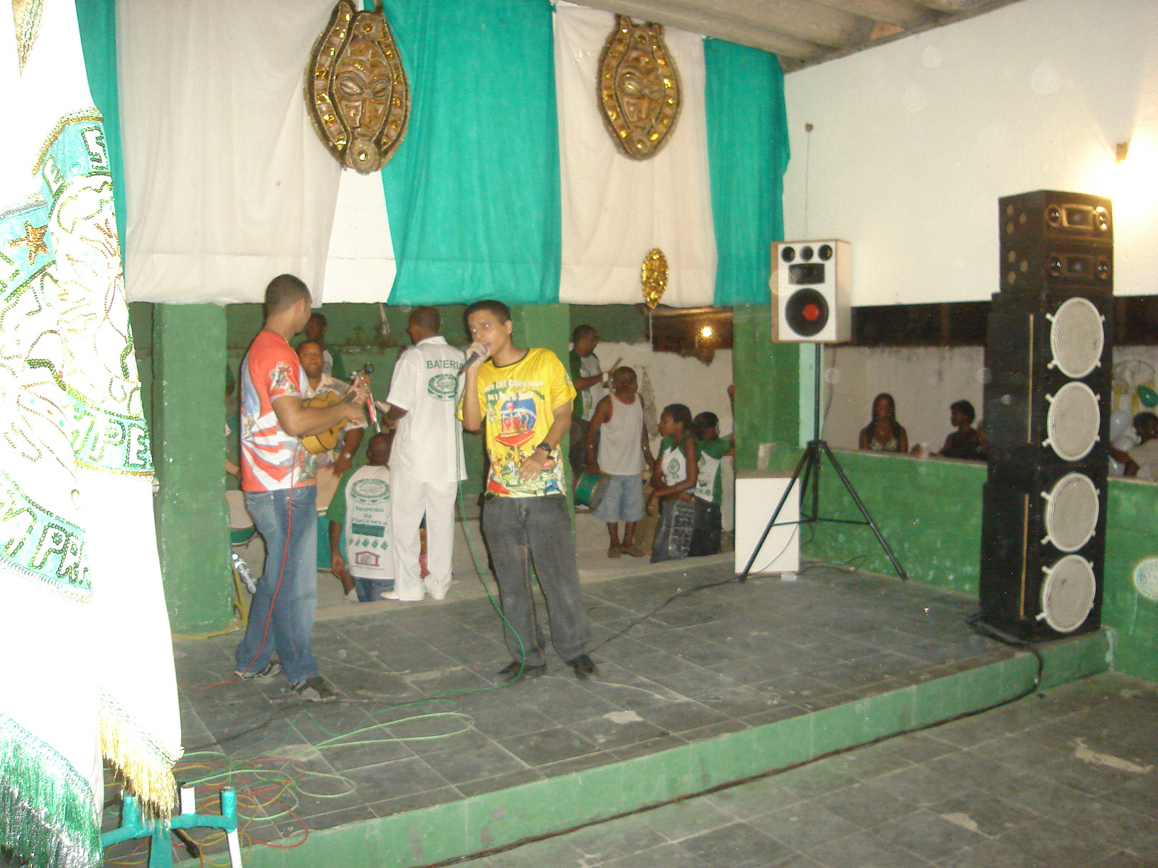 Ensaio da escola de samba GRES Império da Praça Seca, em 22/11/2009. Quartas-de-final da disputa interna de samba enredo. No palco, Leandro Rocha, também chamado de Leandrinho da Praça Seca, defendendo o samba nº 01, de sua parceria (Leandro Rocha, Raíssa Oliveira, Sérgio e Cláudio).